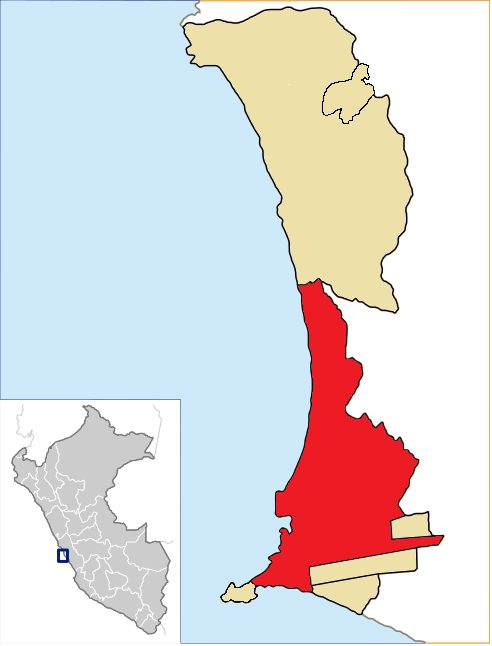 Callao Distrito